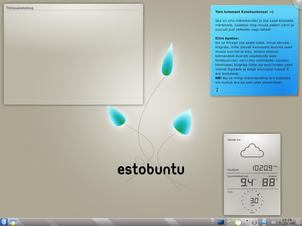 Estobuntu 9.10 default desktop